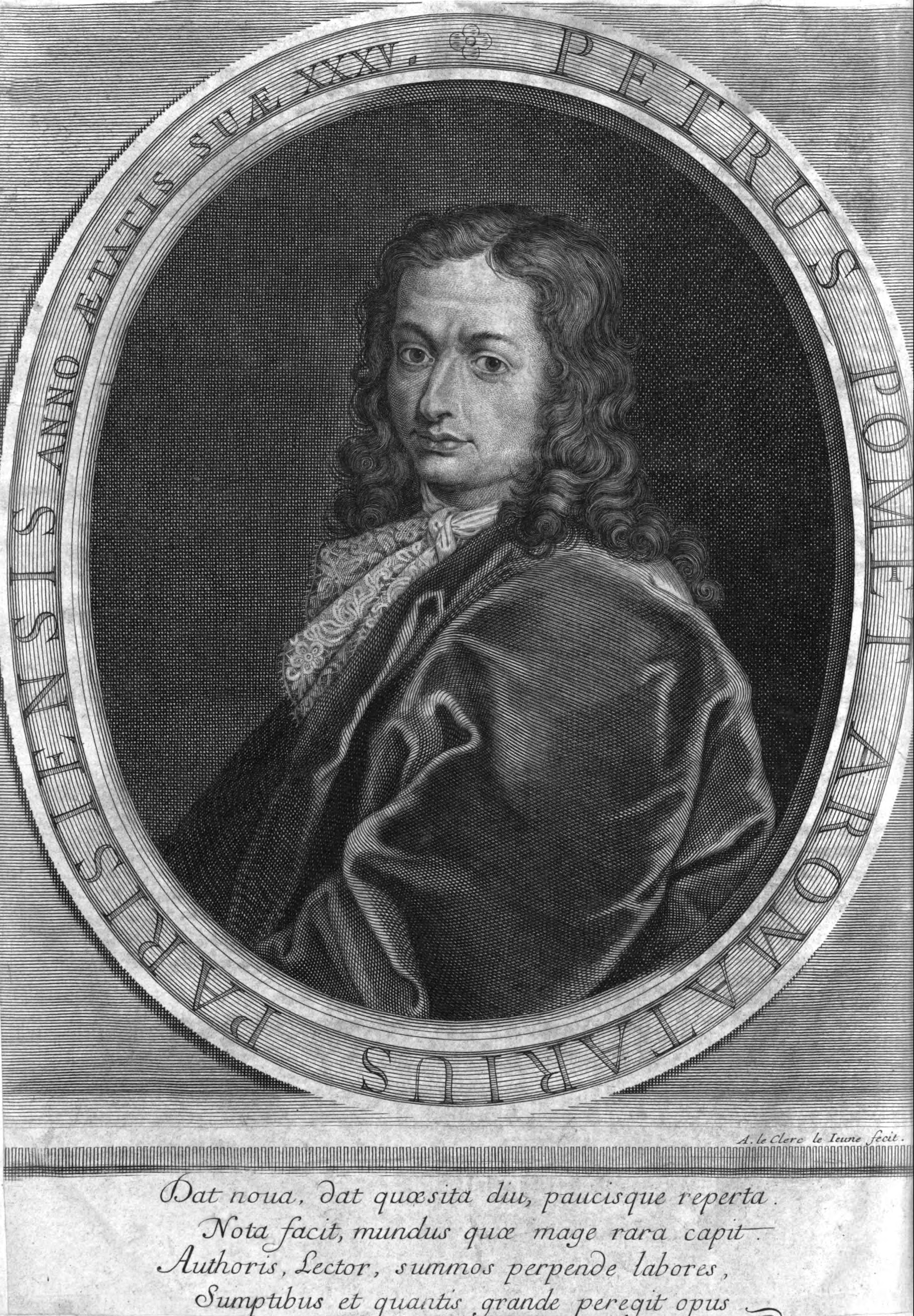 portrait dans son œuvre